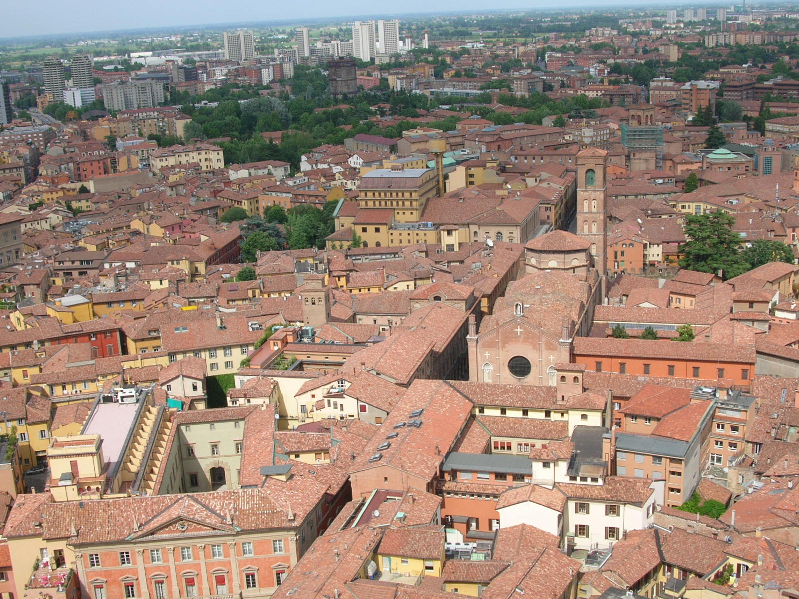 foto del raduno wikipedia bologna 2006 - Vista dall'alto della Torre degli Asinelli: Via Zamboni, chiesa di San Giacomo Maggiore, sullo sfondo il Fiera District